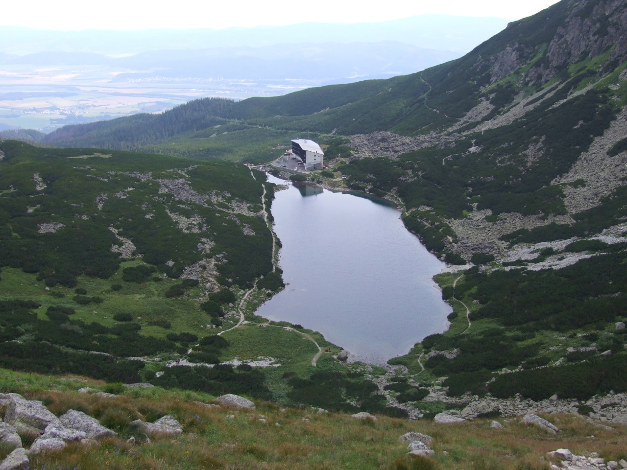 Dolina Wielicka, Wielicki Staw i "Dom Śląski"